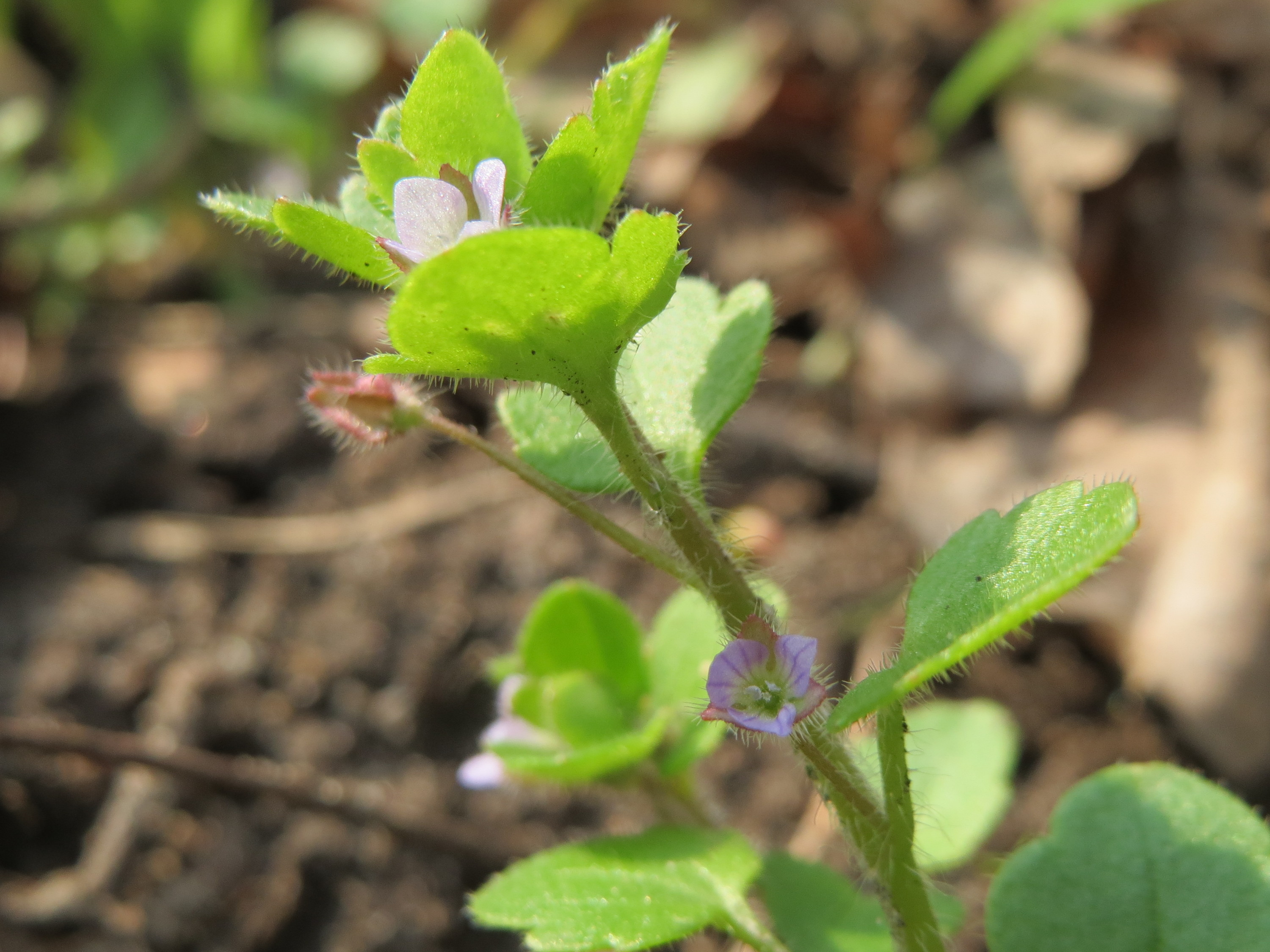 Efeu-Ehrenpreis (Veronica hederifolia) im Schwetzinger Hardt